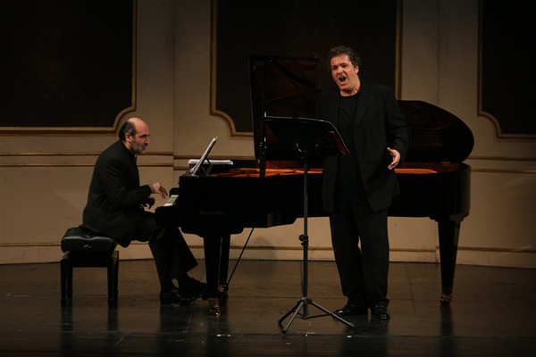 Victor Torres interpretando el Viaje de invierno de Schubert, con Fernando Pérez al piano.